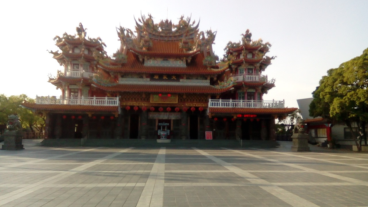 位於鹽田里一帶 四草大道往東轉大眾路即可抵達